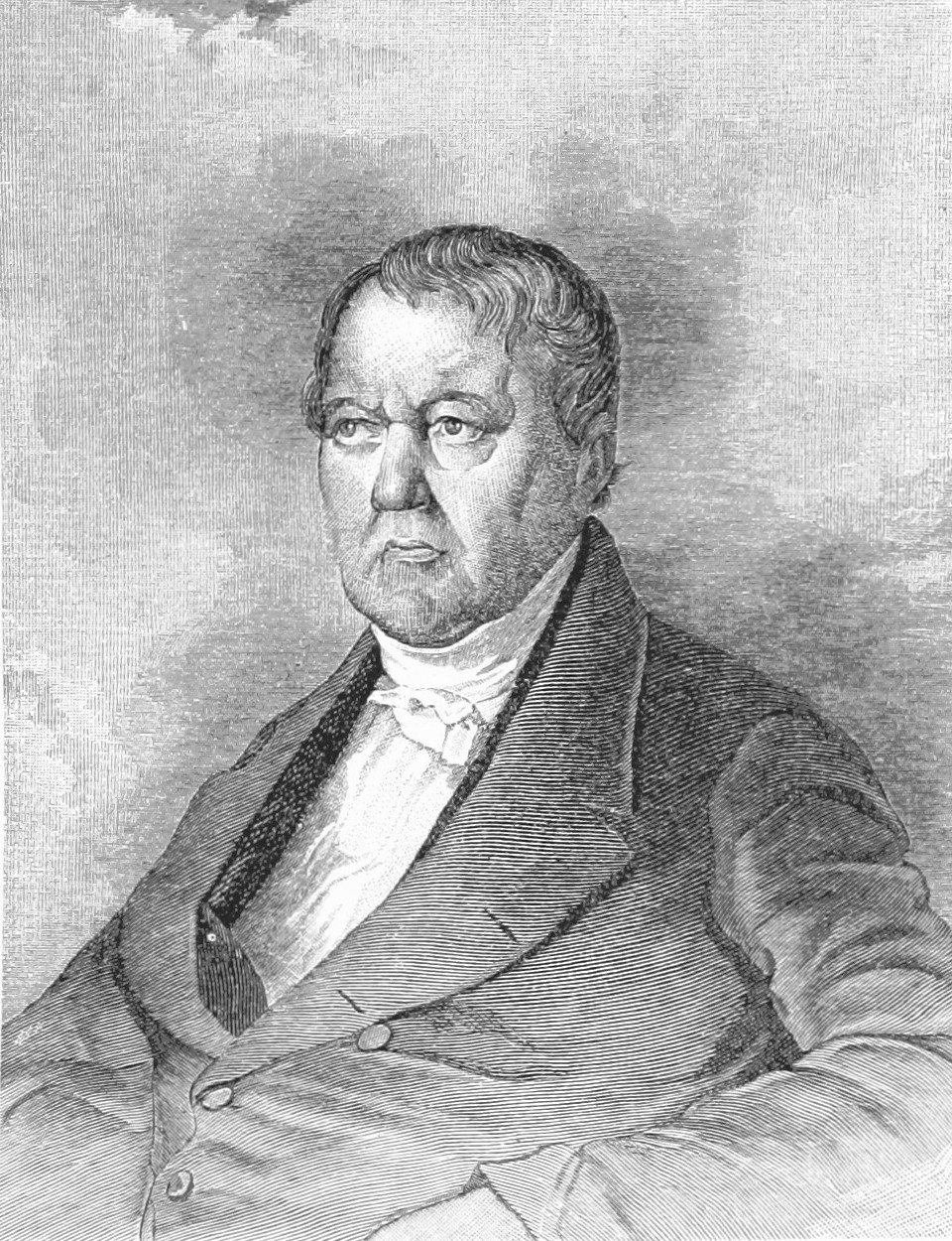 Vaczlav János Tomaschek